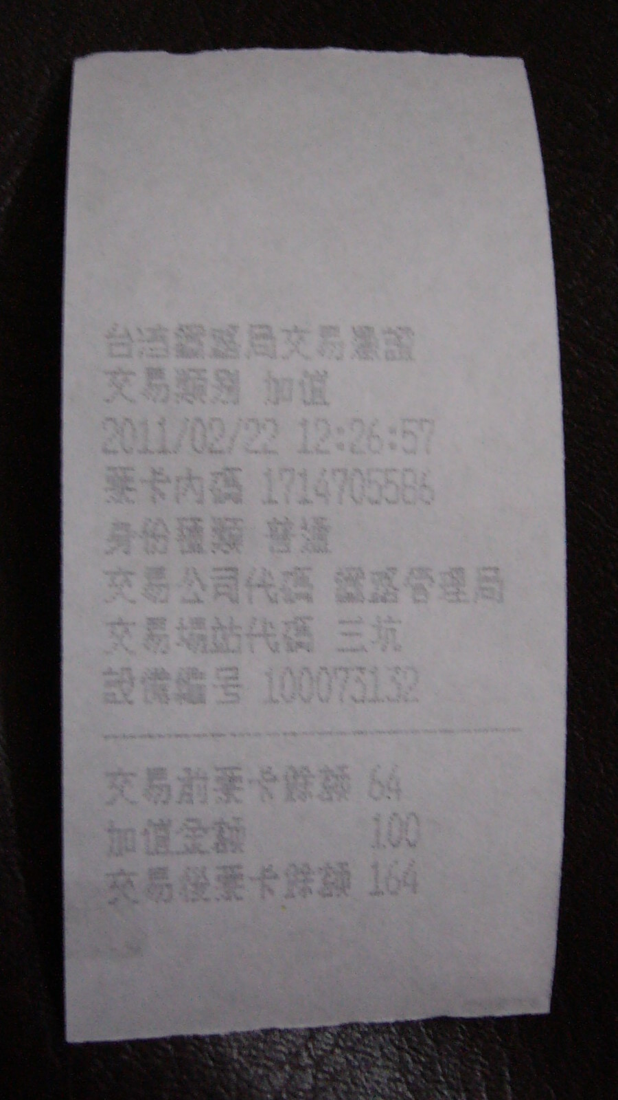 臺灣鐵路管理局三坑車站開出的悠遊卡加值憑證。